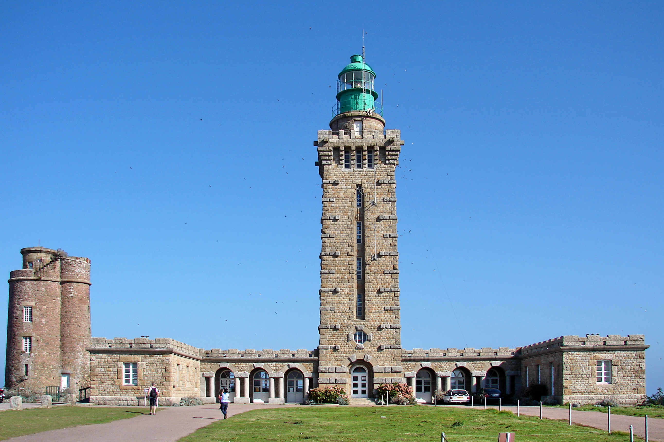 Leuchtturm am Cap Fréhel